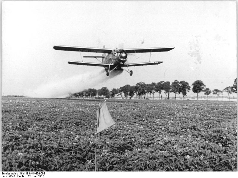 LPG Görka, Kartoffelkäferbekämpfung, Agrarflieger Zentralbild Weiß Weiß-Noa 20.7.1957 Kartoffelkäferbekämpfung mit dem Flugzeug. Stäubemittel gegen Kartoffelkäfer wurden am Donnerstagabend mit einem Doppeldecker der Deutschen Lufthansa auf rund 70 Hektar Kartoffelfläche der Landwirtschaftlichen Produktionsgenossenschaft Görka, Kreis Pelzig und Menzlin im Kreis Anklam gestreut. Insgesamt sollen in diesem Kreis die Schädlinge auf 900 Hektar aus der Luft bestäubt werden. Bei einer Streuungsmenge von 20 Kilogramm pro Hektar schafft das Flugzeug mit einer Ladung Stäubemittel 32 Hektar. Die Stundenleistung beträgt mit Laden, Start und Anflug rund 20 Hektar. Zur Orientierung des Piloten werden in Abständen von 30 Metern abwechsend rote und weiße Fähnchen an den Waldrändern aufgesteckt. UBz: Der Doppeldecker vom Typ An 2 im Einsatz über einem 12 ha-Schlag der LPG Görka.